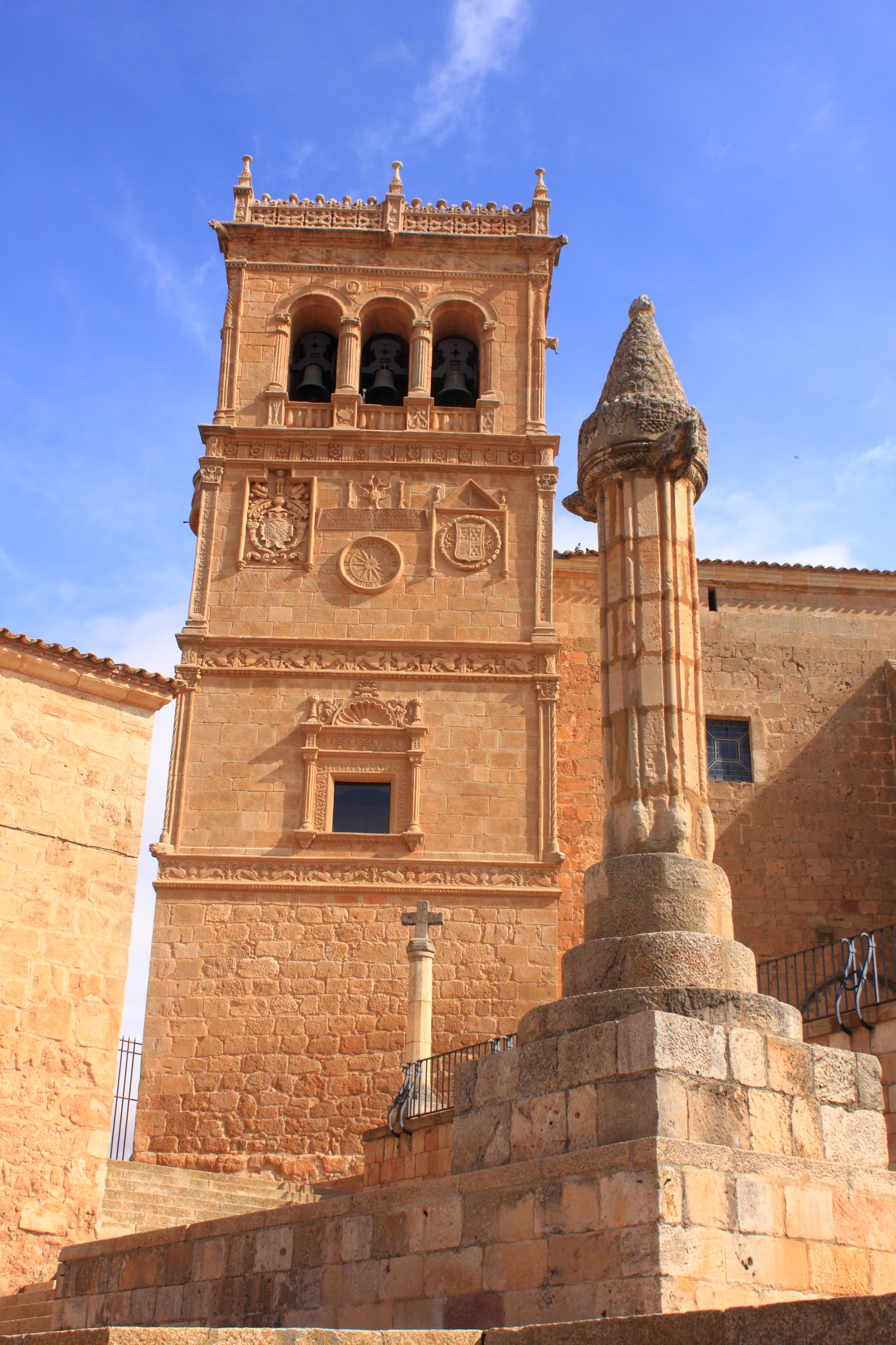 Morón de Almazán, torre